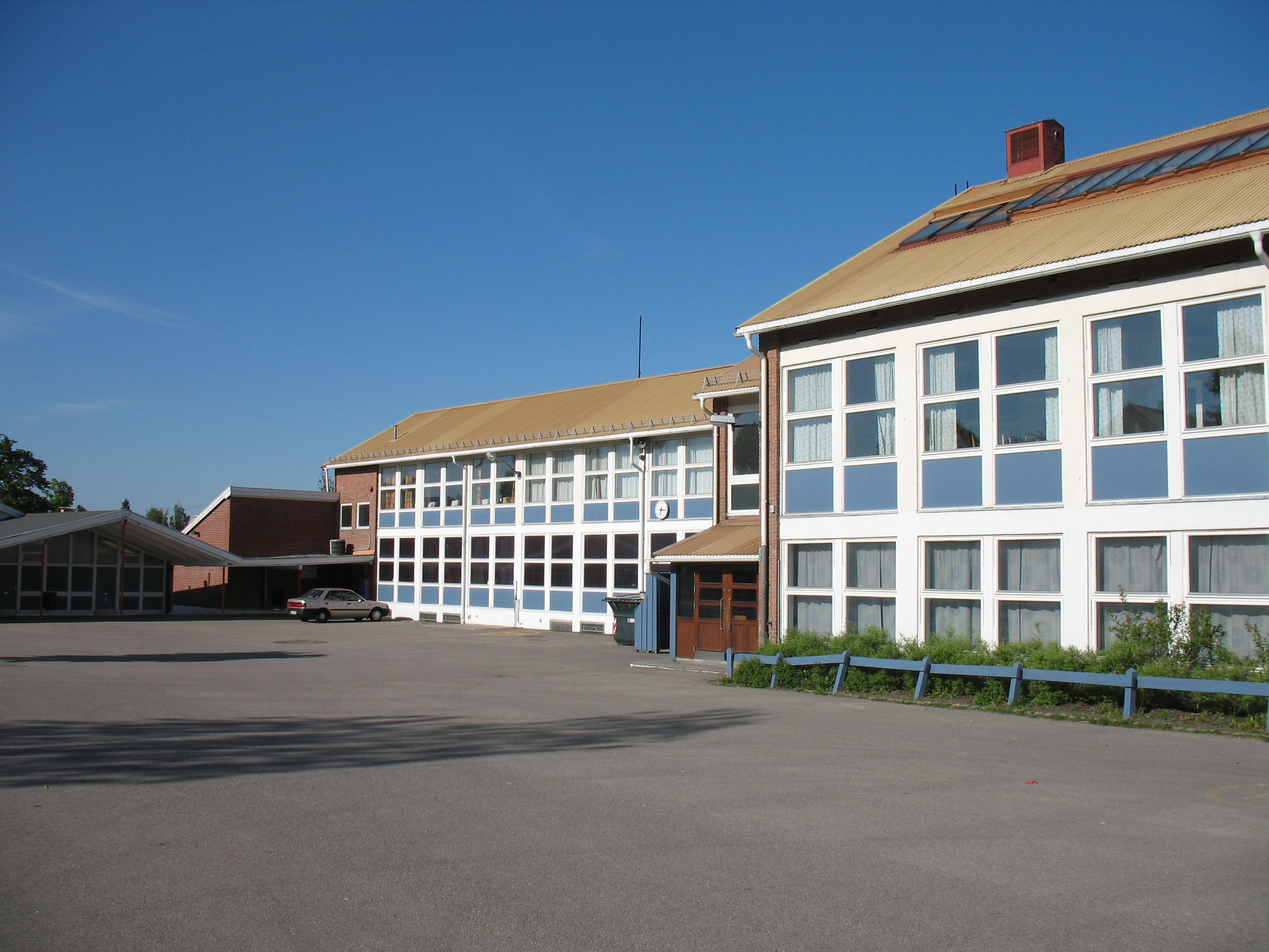 Lambertseter skole på Lambertseter i Oslo